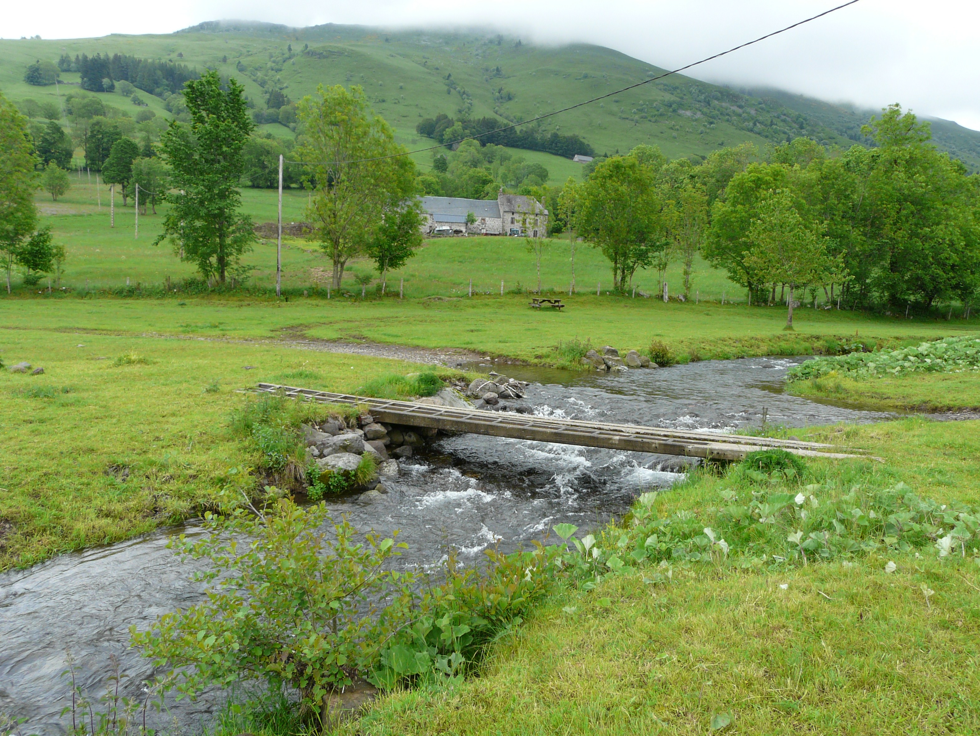 La Santoire au lieu-dit la Gravière, Lavigerie, Cantal, France. Vue prise en direction de l'amont.